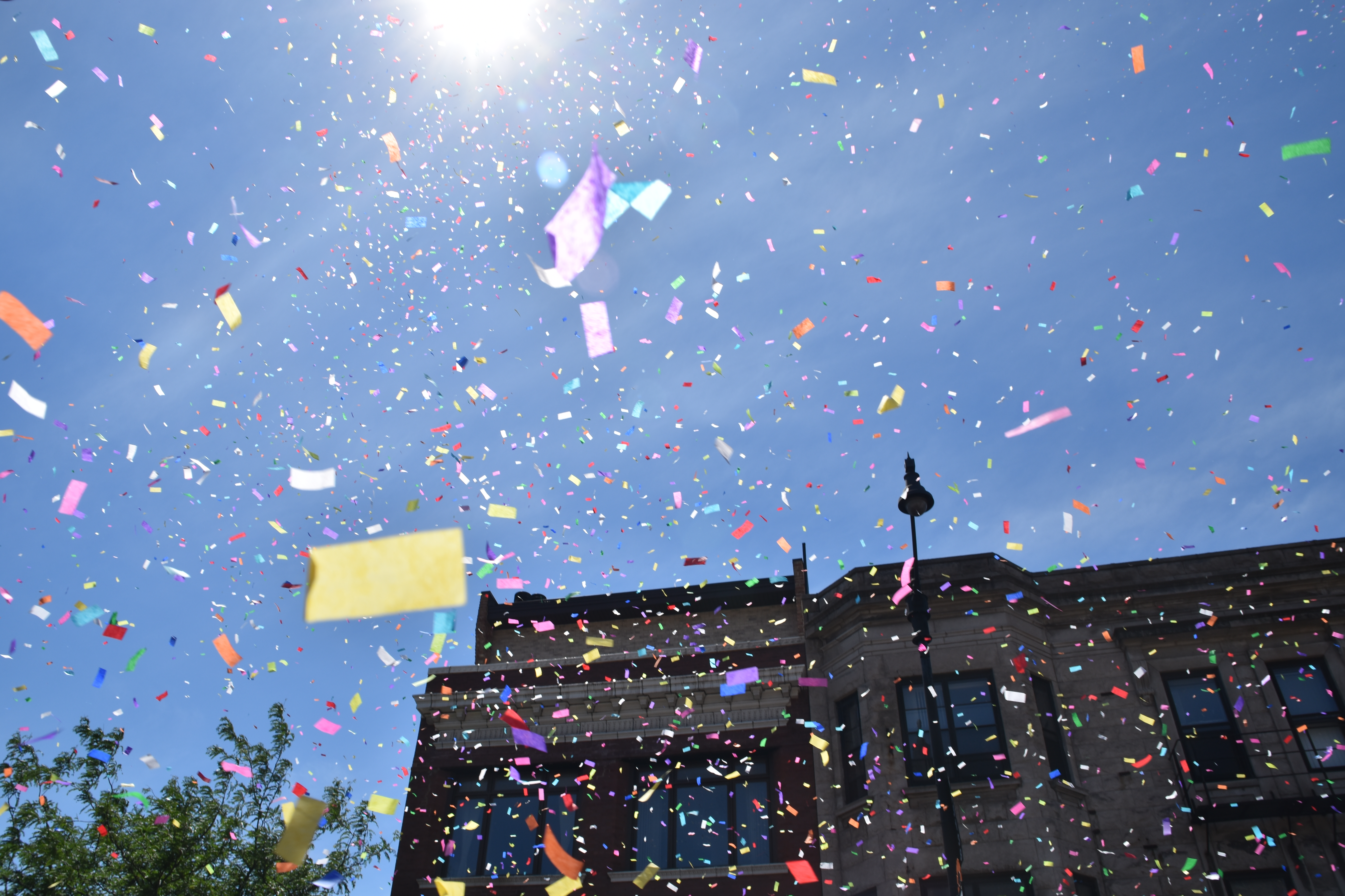 Confetti